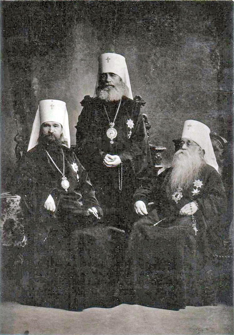 Митрополиты Владимир (Богоявленский), Антоний (Вадковский) и Флавиан (Городецкий)